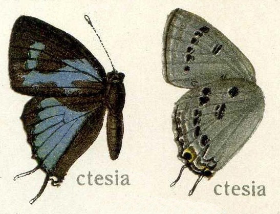 Ancema ctesia, Lycaenidae